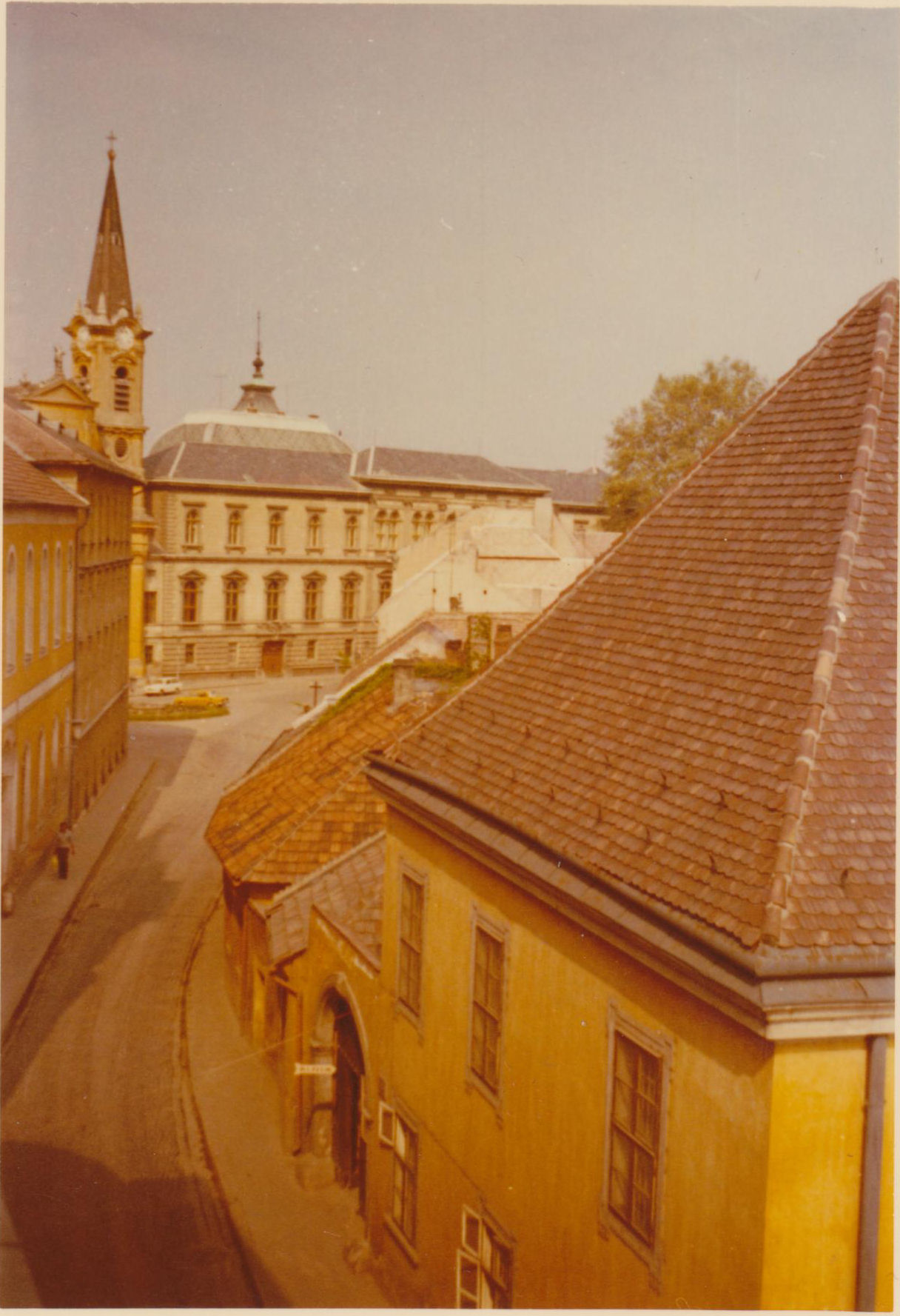 Esztergom-Víziváros (mai nevén) Pázmány Péter utca (szkennelt)